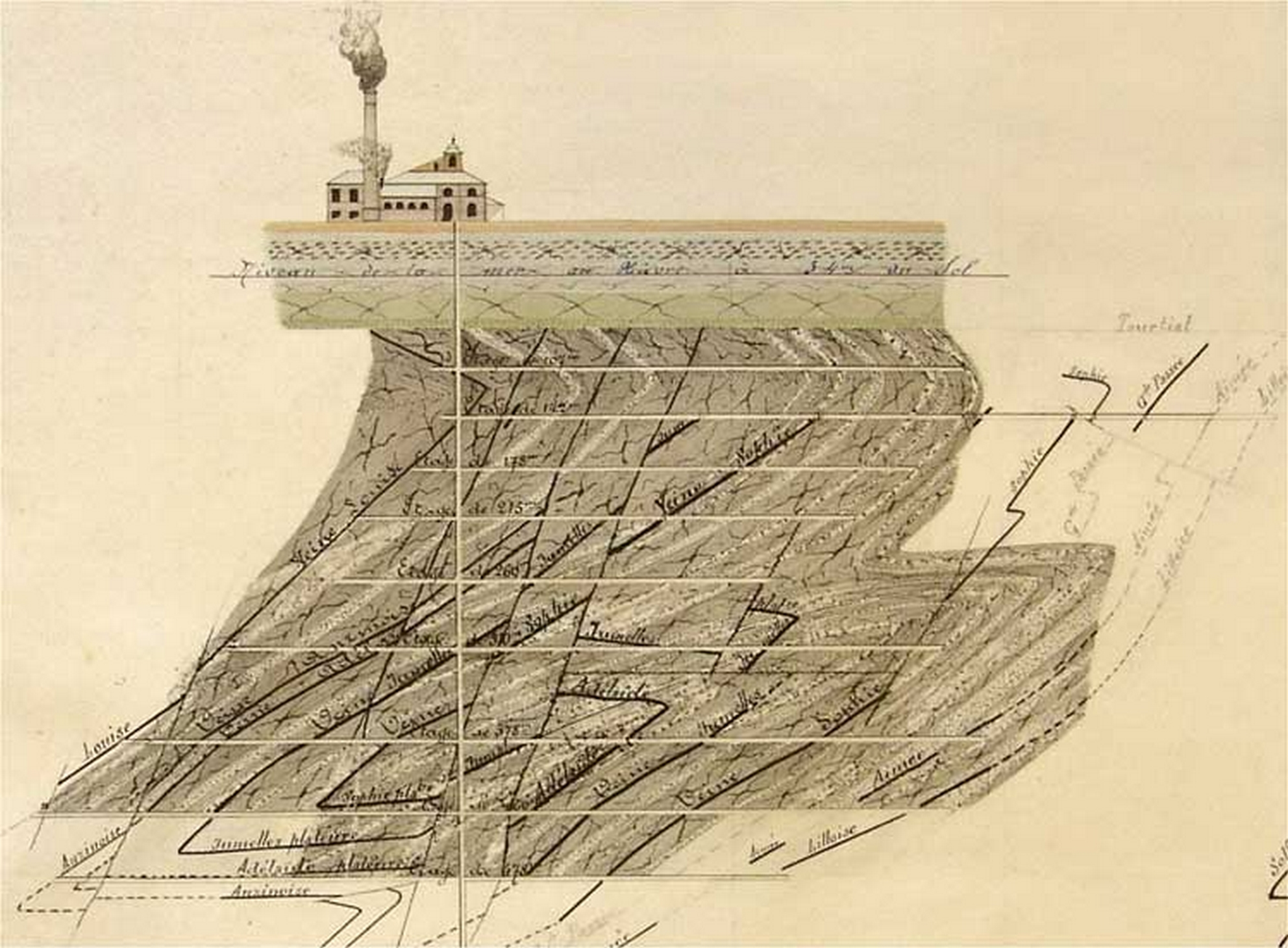 La fosse La Naville ou n° 7 de la Compagnie des mines de Douchy était un charbonnage constitué d'un seul puits situé à Lourches, Nord, Nord-Pas-de-Calais, France.